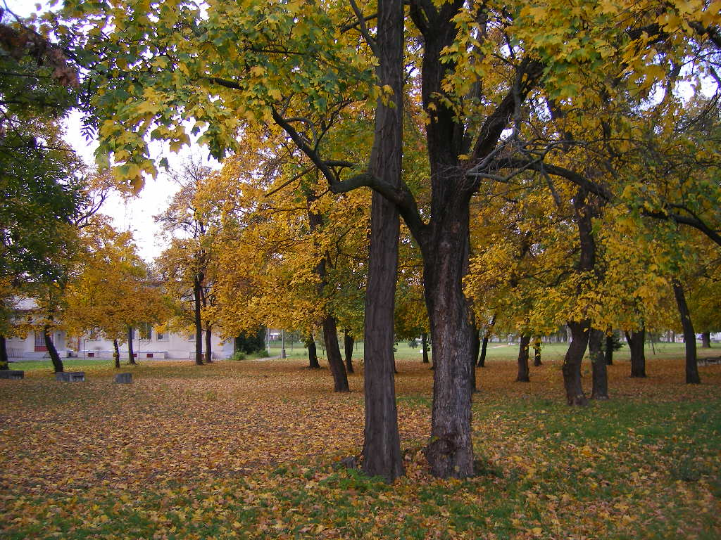 Ógyalla/Bagota - a bagotai park ősszel